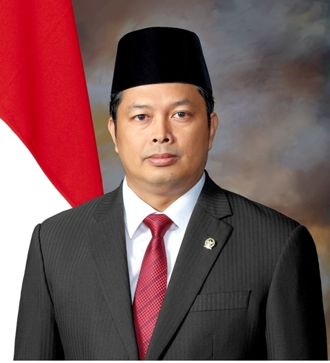 Mahyudin sebagai Wakil Ketua MPR 2014-2019